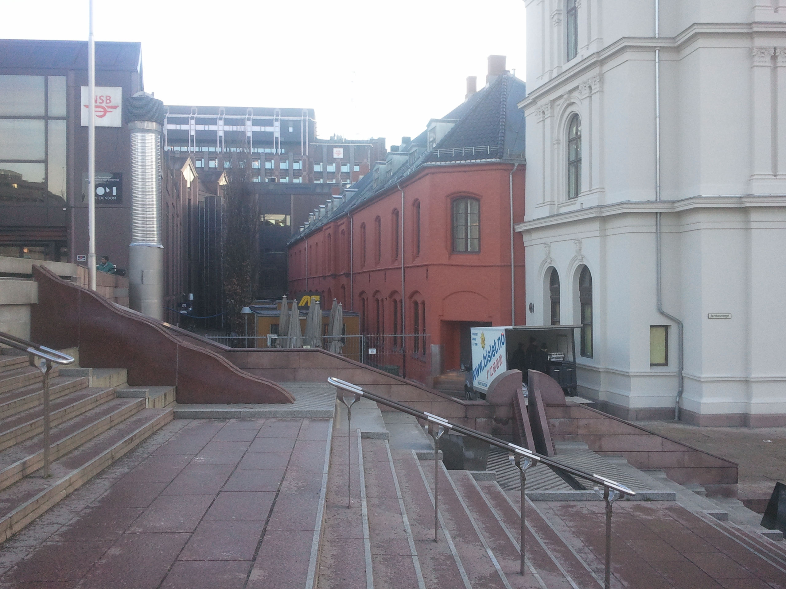 Fasaden mot tidligere Jernbanegata, mellom gamle Østbanestasjonen og nye Oslo Sentralstasjon, 2013